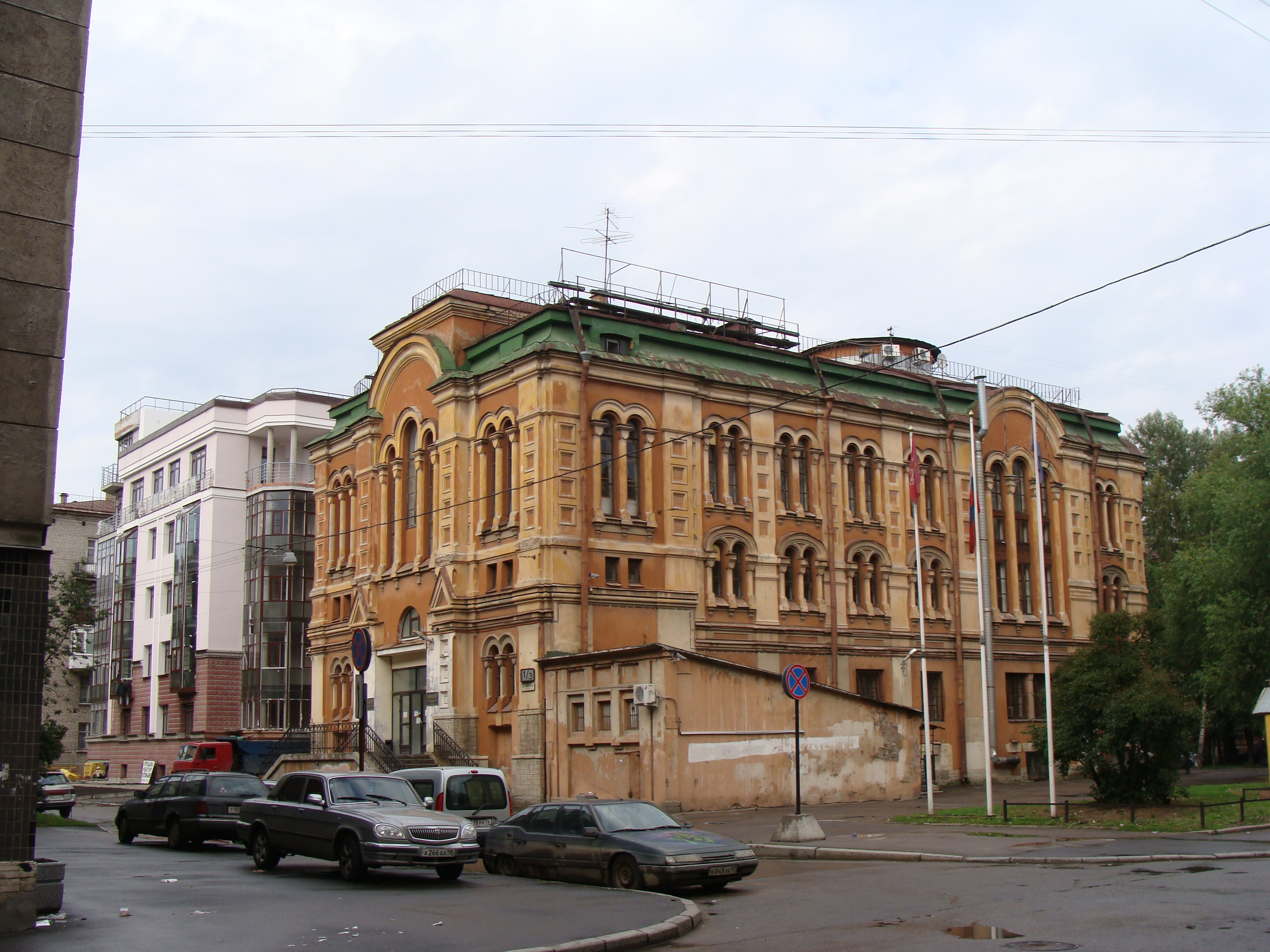 Подворье Пюхтицкого Успенского женского монастыря с Тихвинской церковью